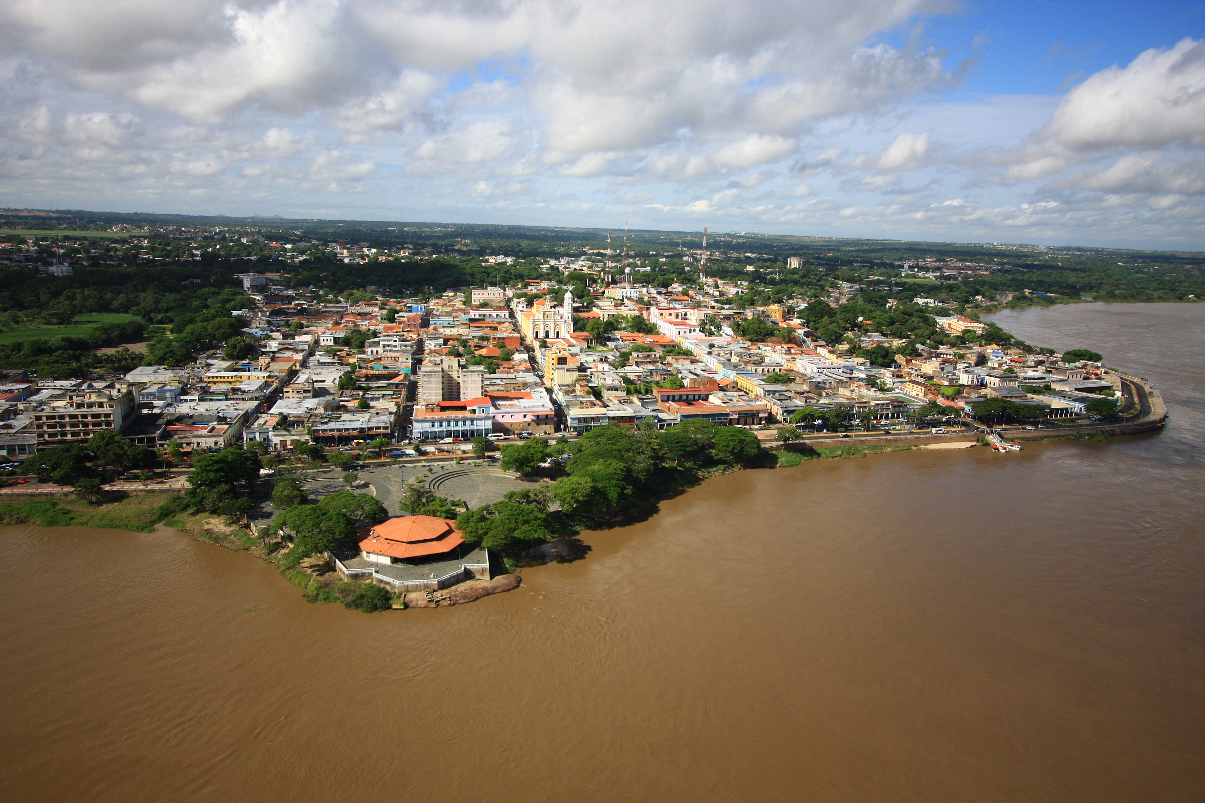 Vista area de Ciudad Bolívar (al fondo Catedral de Ciudad Bolívar)